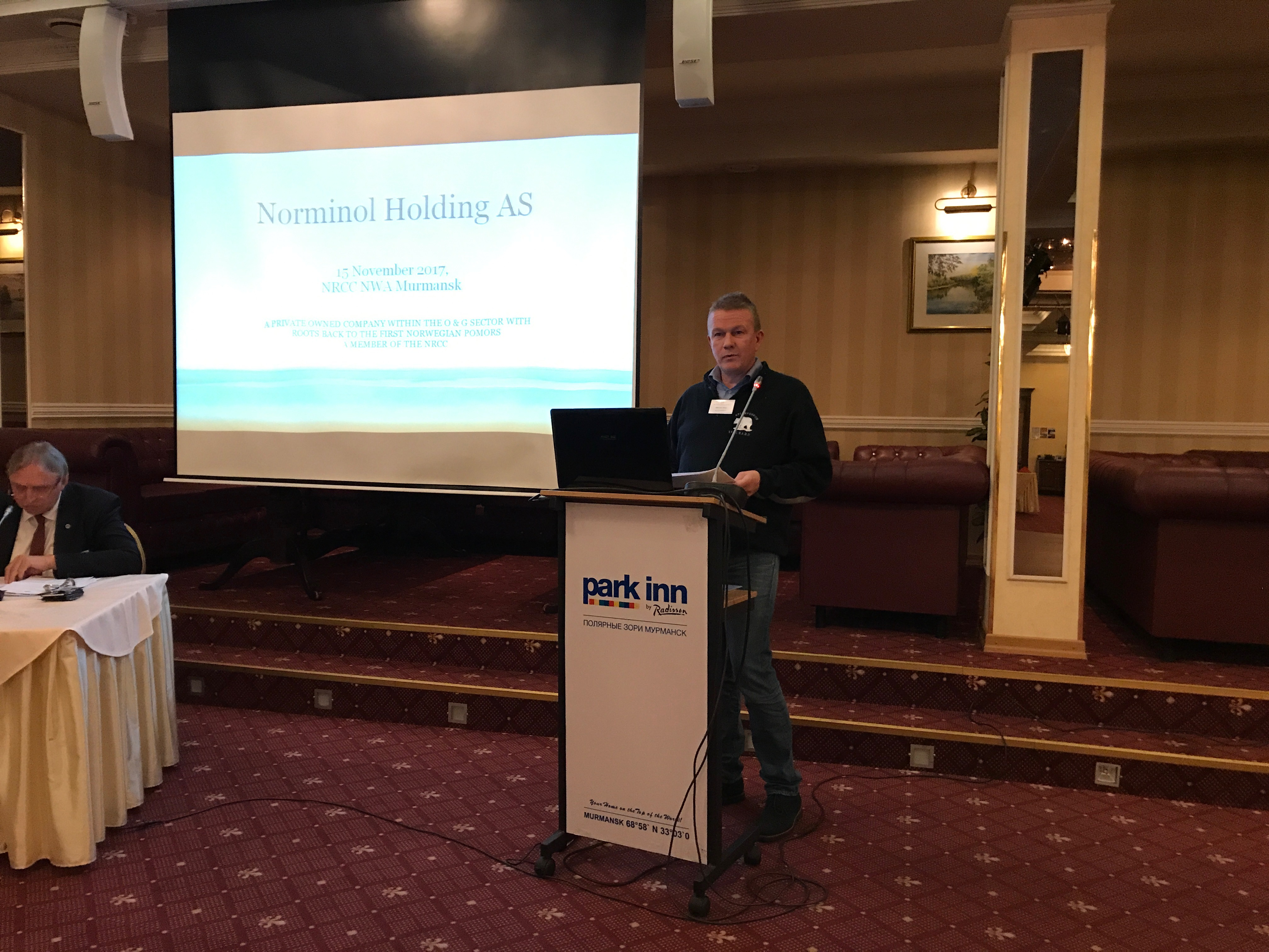 Transport & logistikk i nordområdene